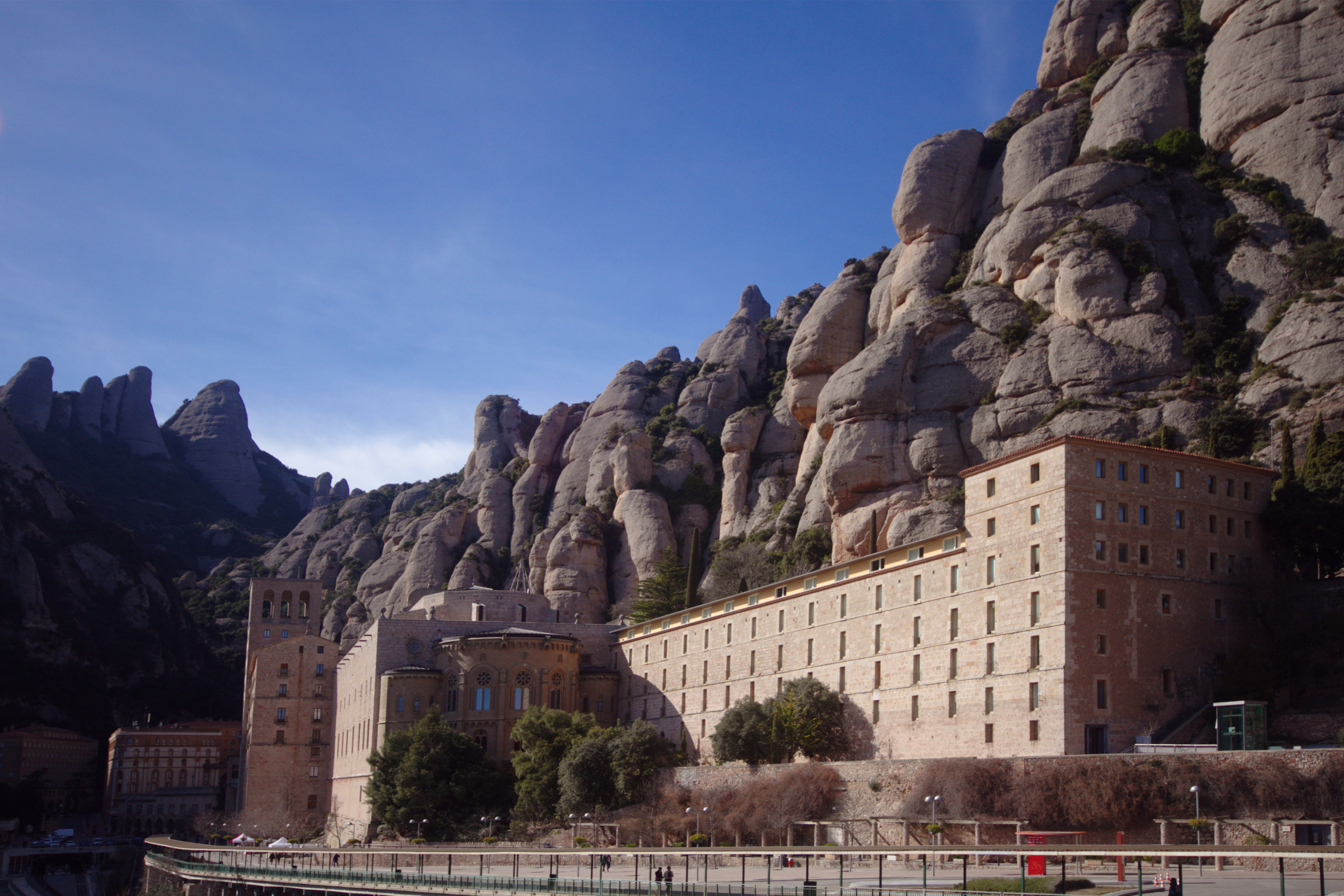 Mosteiro de Montserrat